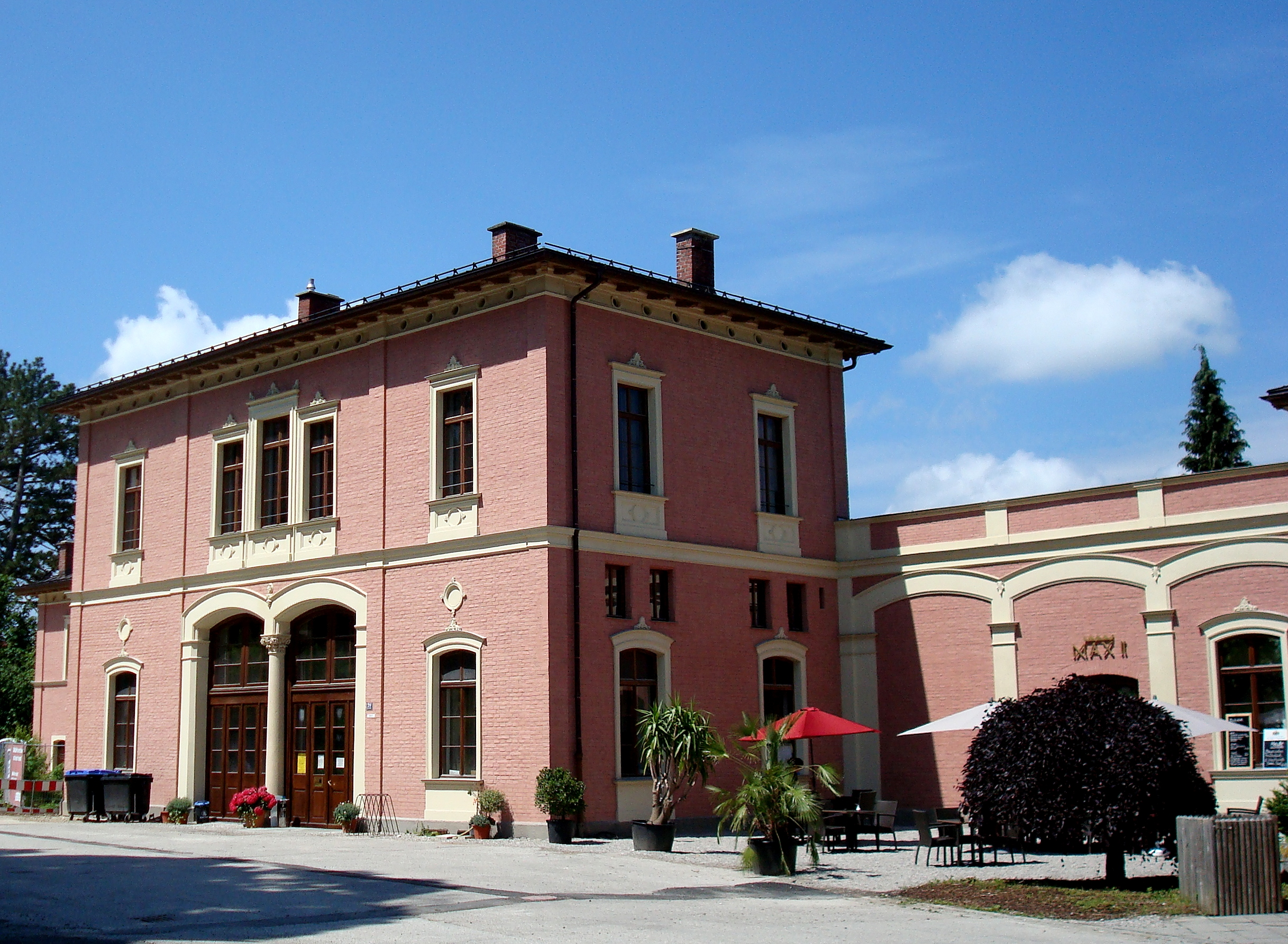 Feldafing, Bahnhofsplatz. Das ehemalige Empfangsgebäude des Bahnhofs Feldafing, ein zweigeschossiger, unverputzter Backsteinbau mit Hausteingliederungen, Flachwalmdach und zwei seitlich angebauten Pavillons, wurde um 1865 im Maximilianstil unter der Leitung von Georg von Dollmann erbaut. Nach einer umfassenden Renovierung und dem Umbau der Innenräume wird das Gebäude seit Mai 2013 als Rathaus der Gemeinde Feldafing genutzt.